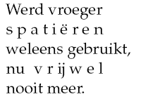 Voorbeeld van nadruk door spatiëren, een methode die (gelukkig) in onbruik is. (Let erop dat de ij niet gescheiden wordt). Lettertype: Palatino (Eigenlijk: URW Palladio), eigen werk.